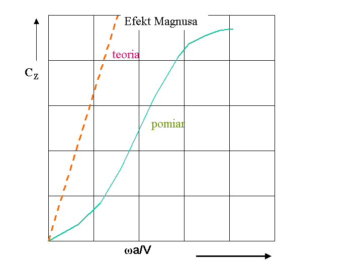 Teoretyczny i mierzony efekt Magnusa